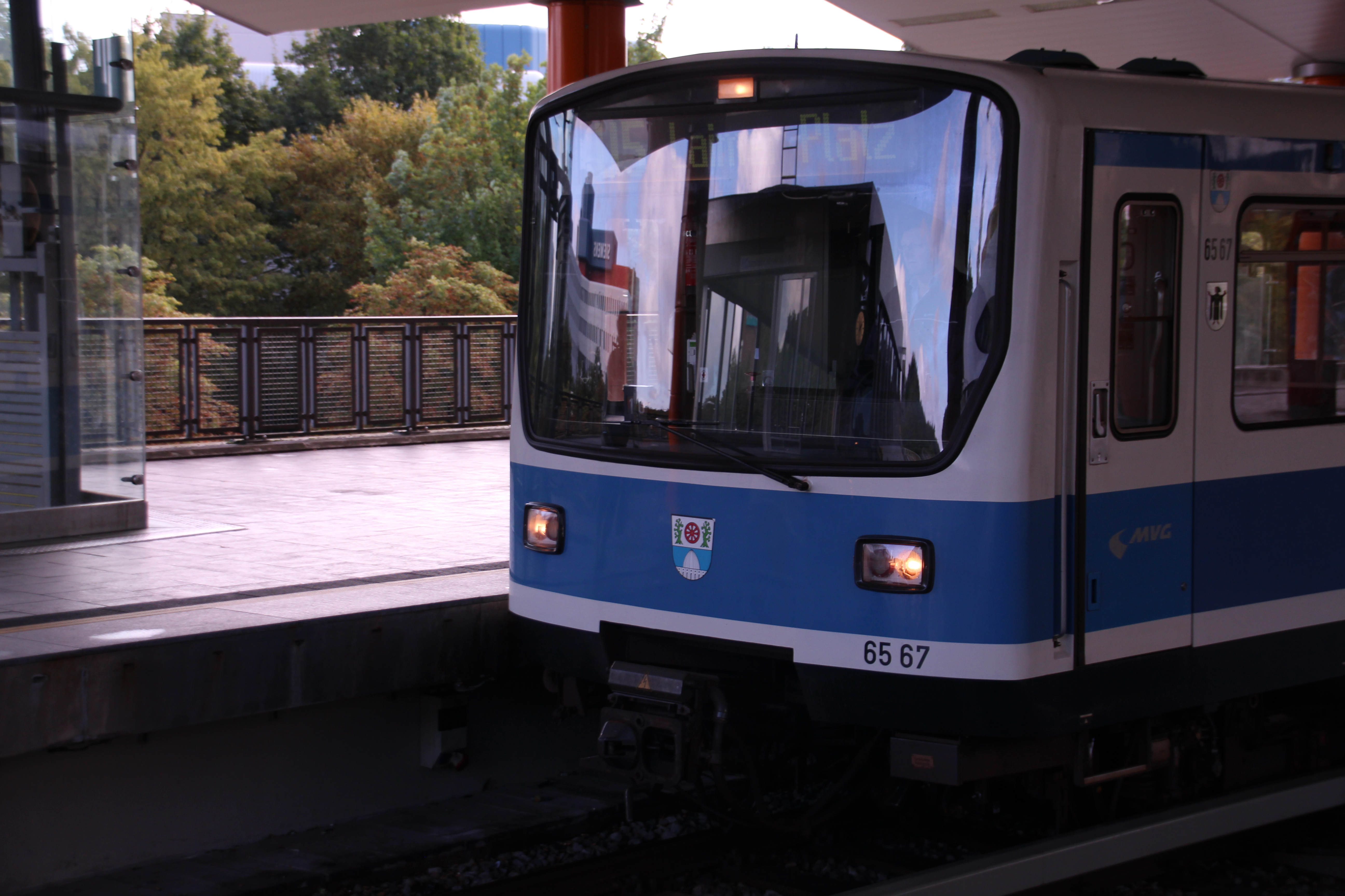 Wagen 567 des Typ B der U-Bahn-Garnituren des MVG. Mit Garchinger statt Münchener Stadtwappen.